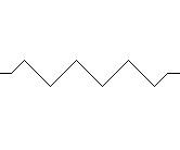 Symbole schématique d'une résistance électrique en Amérique du nord.